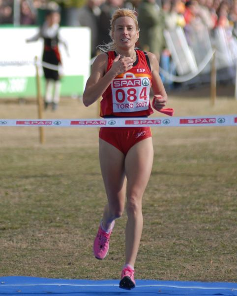 Marta Domínguez during EC Cross 2007